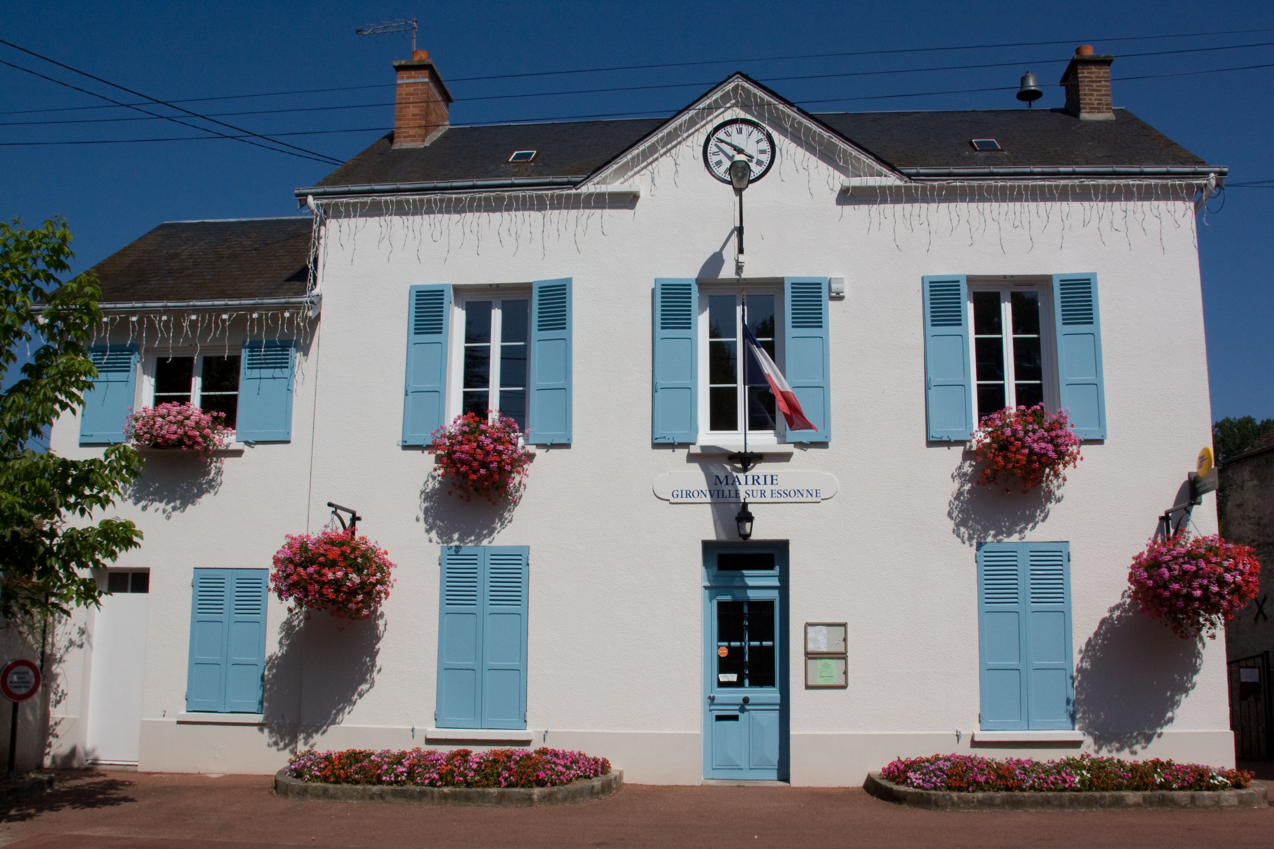 Mairie de Gironville-sur-Essonne, Gironville-sur-Essonne, Essonne, France